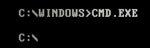 Llamada al comando CMD.EXE(linea de comandos) desde la consola Windows